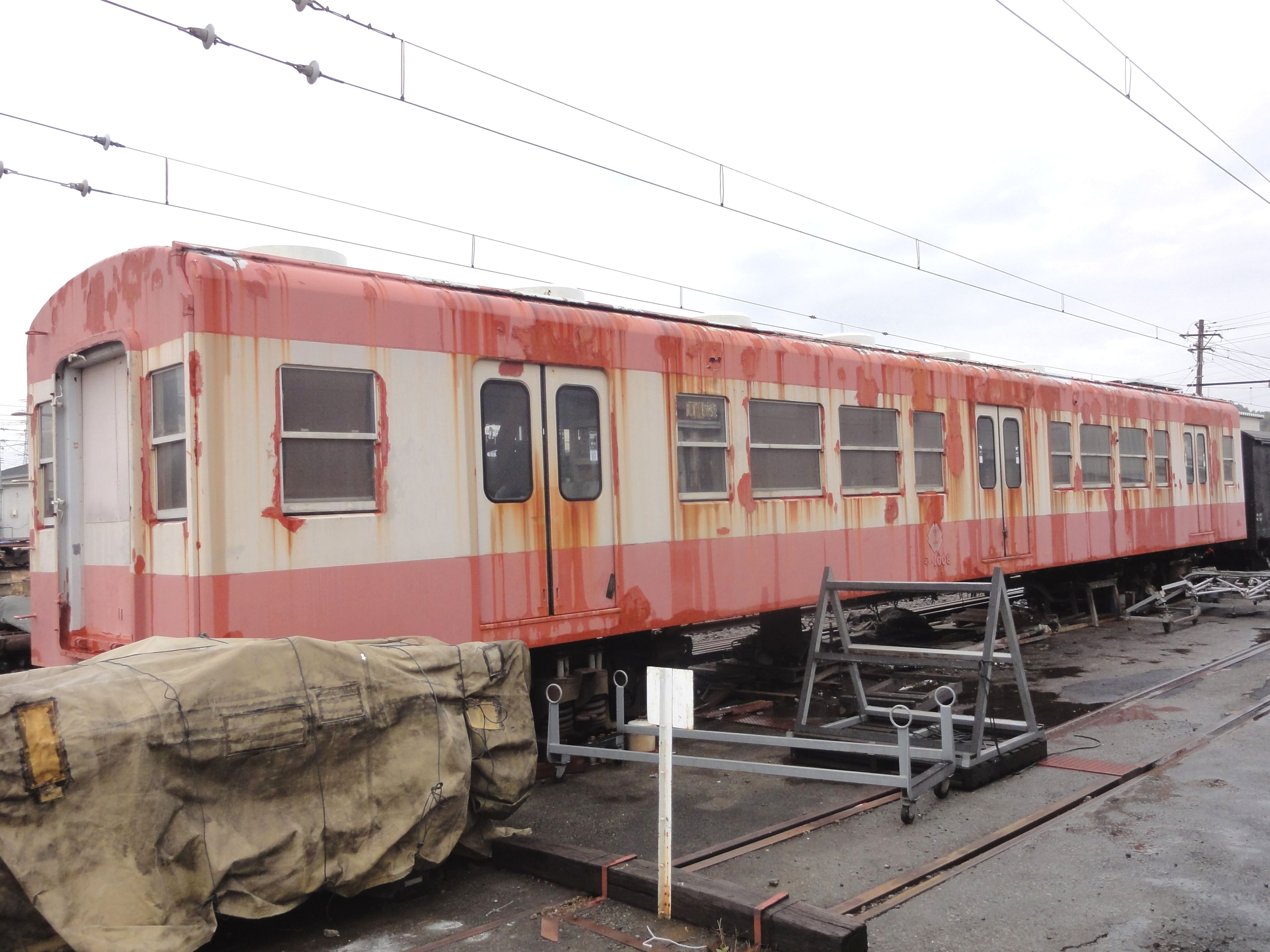 伊豆箱根鉄道1000系電車1008、伊豆箱根鉄道大場工場にて